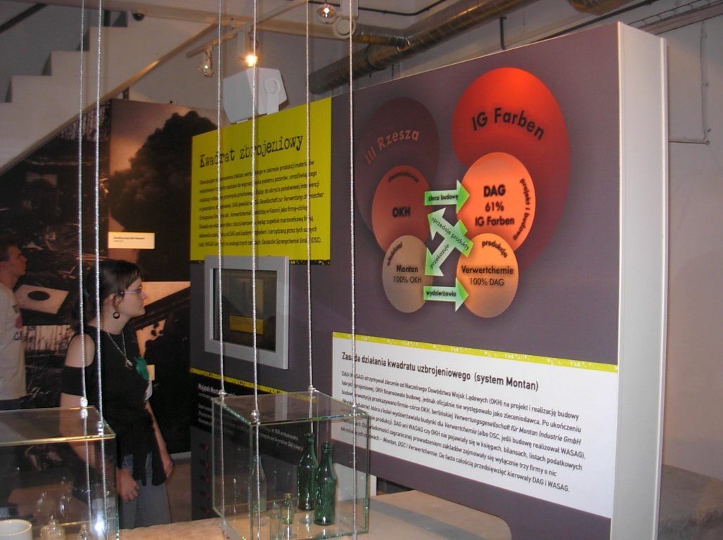 Eksploseum w Bydgoszczy - jedna z wystaw